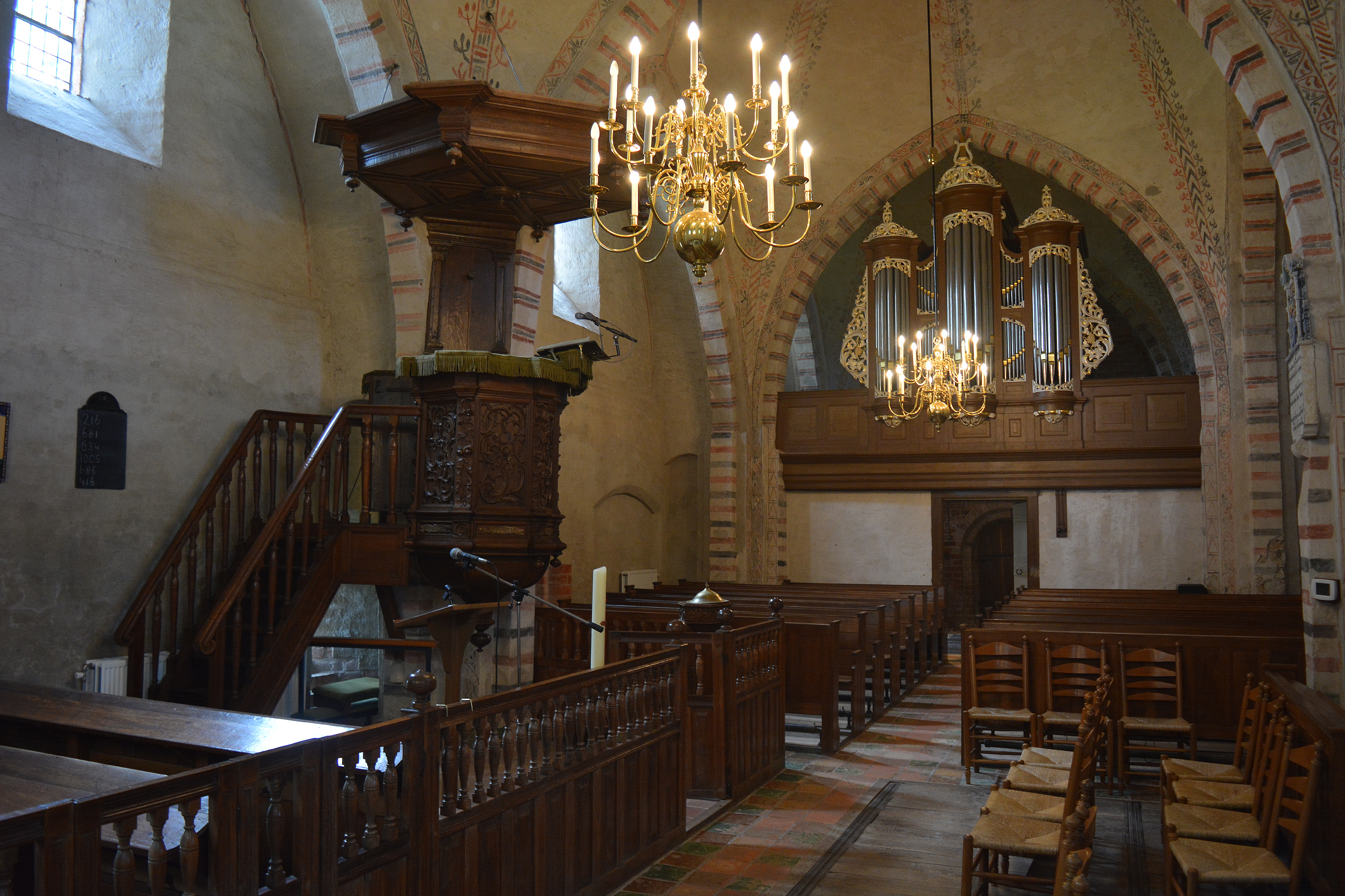 Annetsjerke, Hantumhuzen, oersicht ynterieur